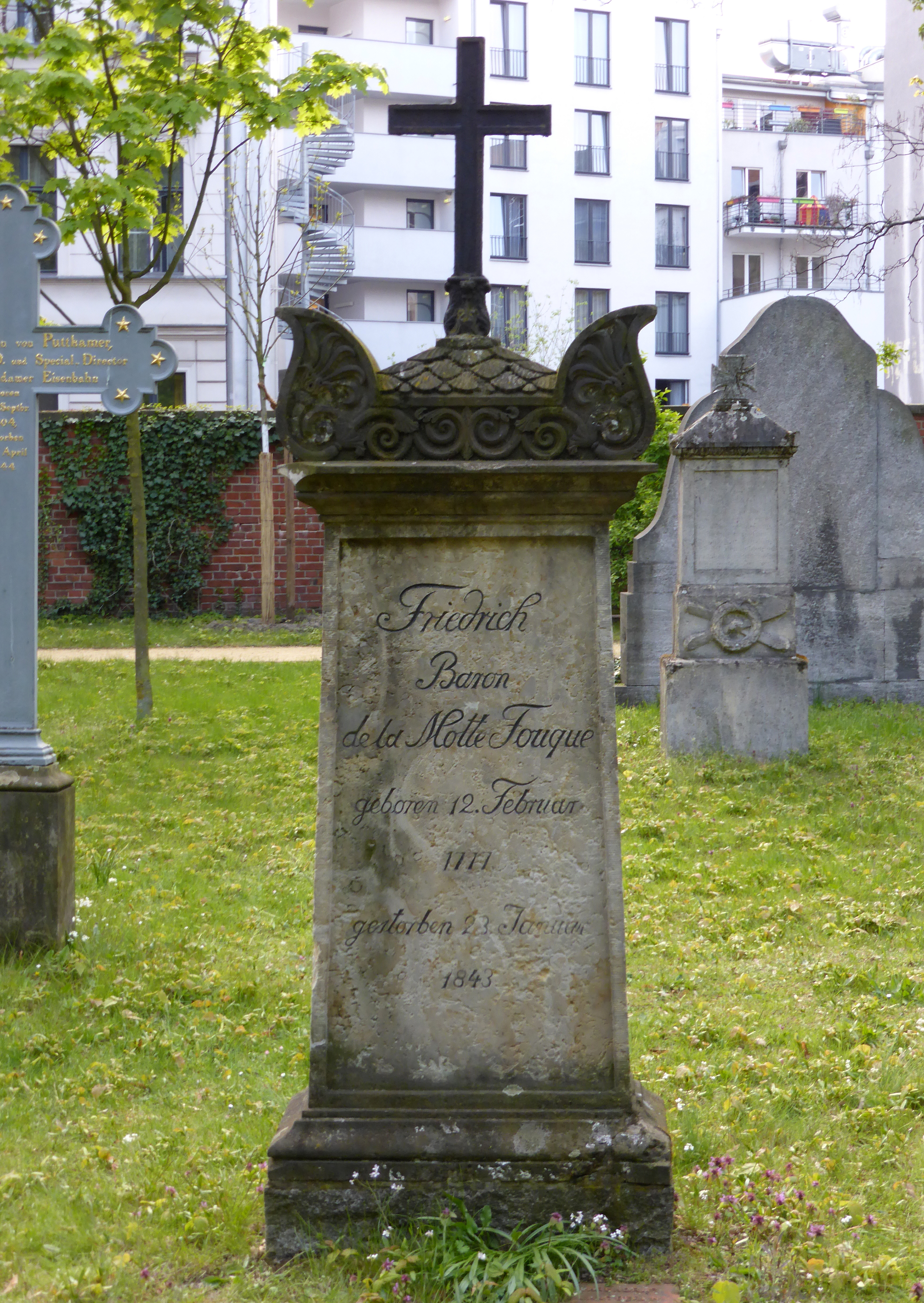 Alter Garnisonfriedhof Berlin